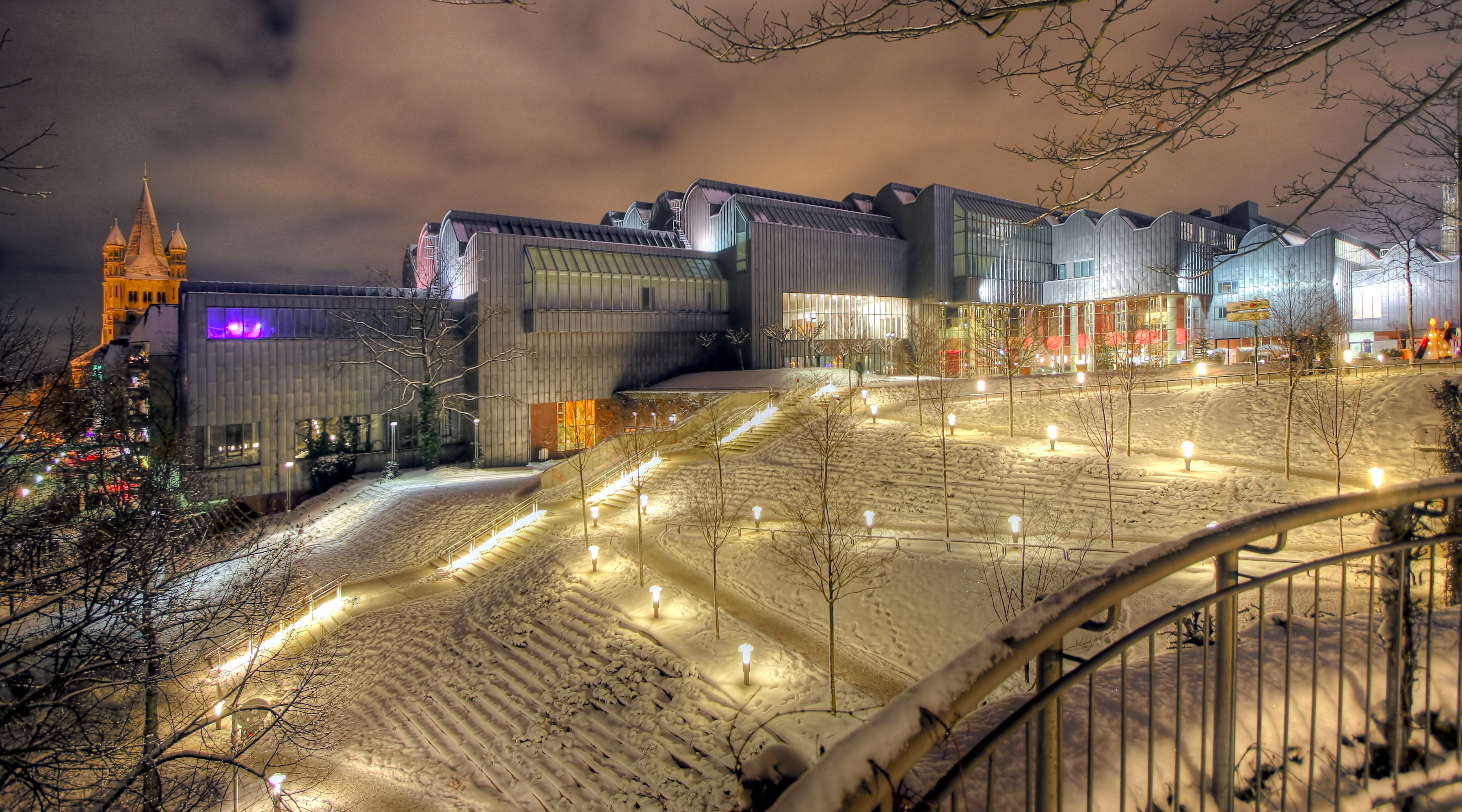 Philharmonie Köln und Museum Ludwig in einer Winternacht nach Schneefall.